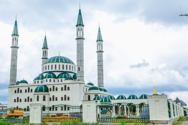 Соборная мечеть в городе Черкесск